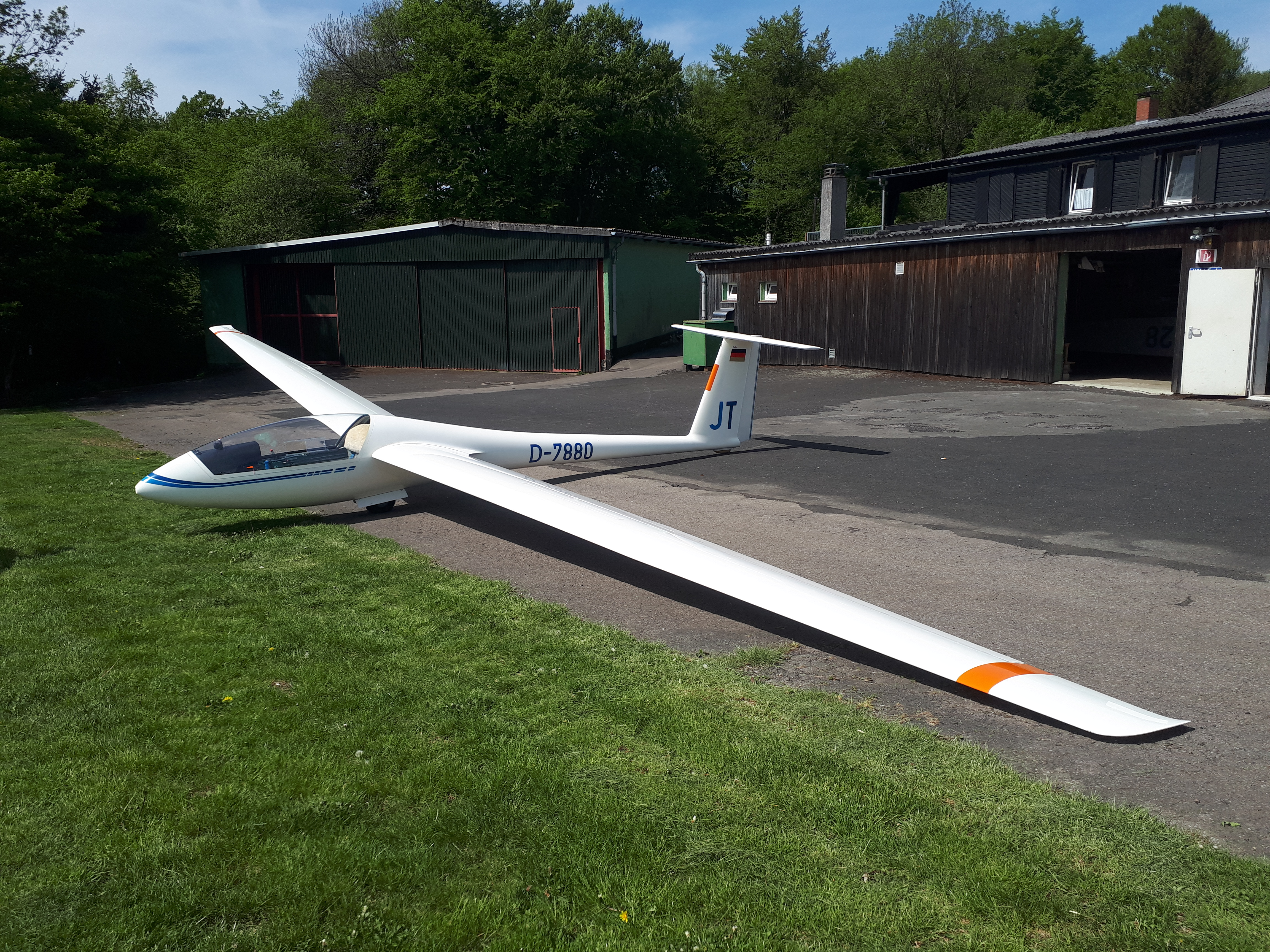 LS-4a am Flugplatz Ithwiesen